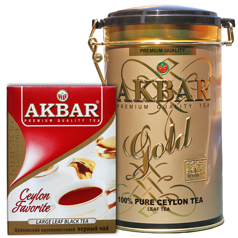 Té Akbar